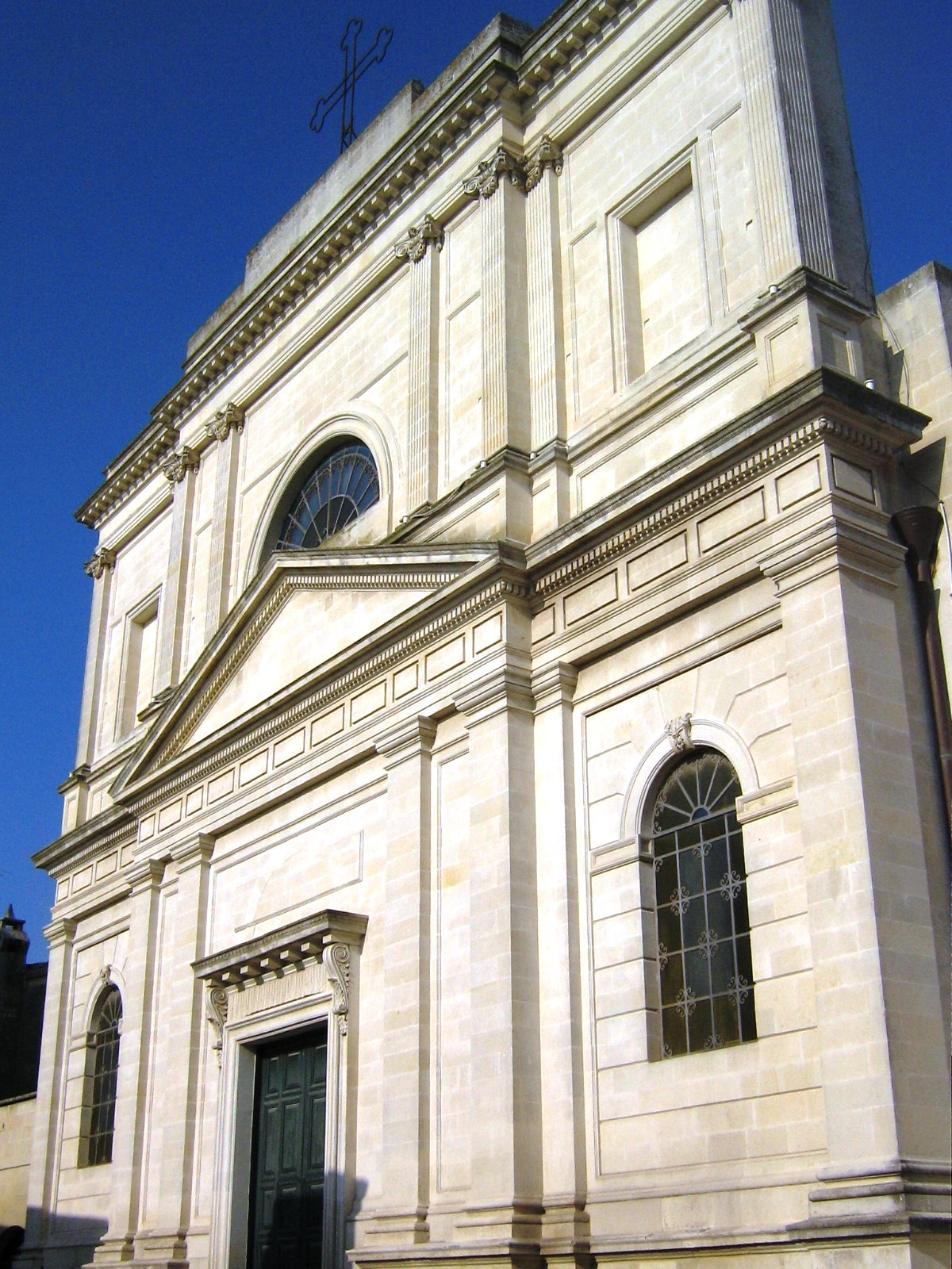 Chiesa Madre di Castrignano de' Greci